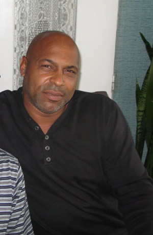 Photo de Jean Manuel Thétis prise à Gonesse chez son père